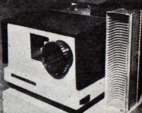 Rzutnik przezroczy Proton (ZSRR).